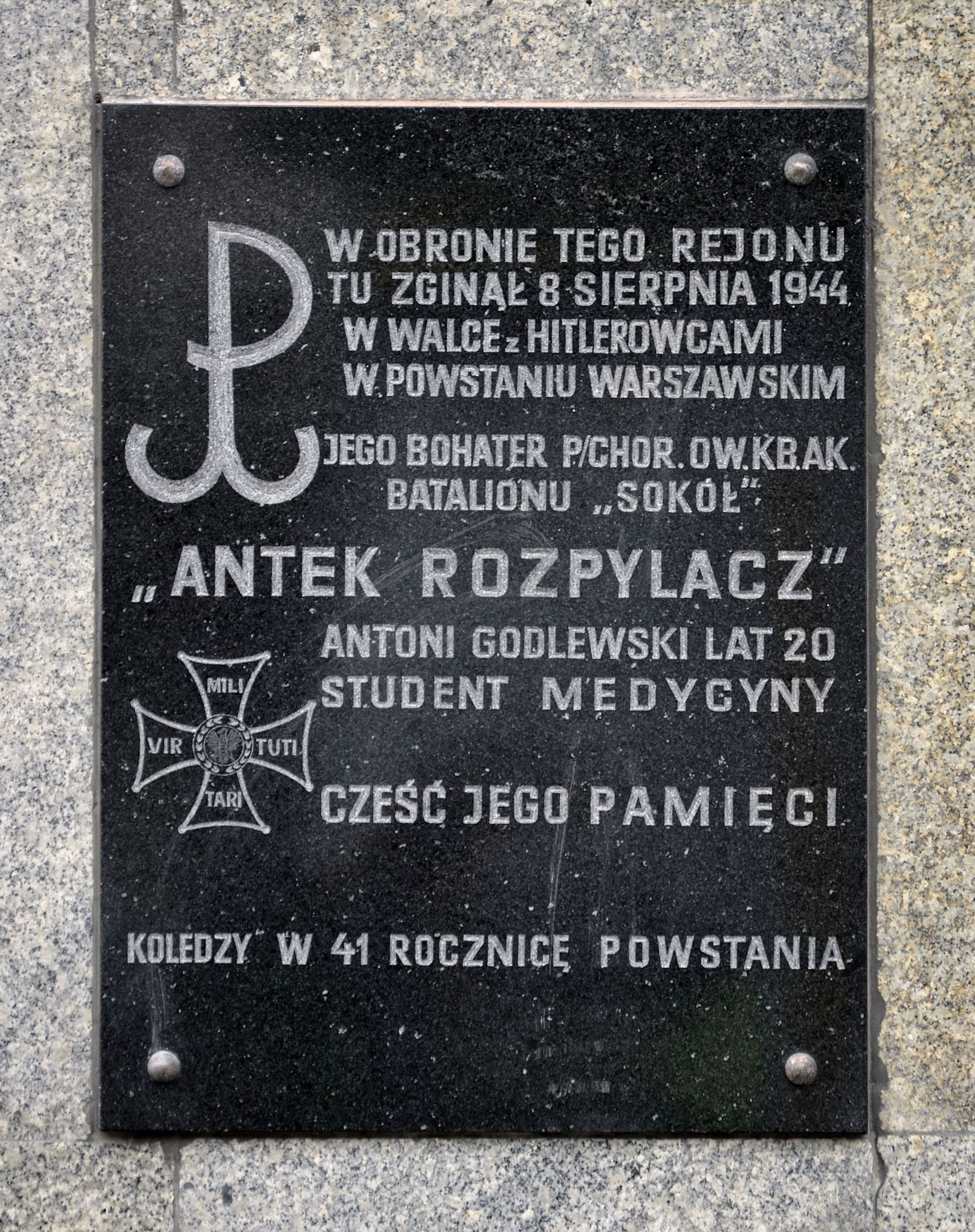 Tablica upamiętniająca Antoniego Godlewskiego przy Alejach Jerozolimskich 11/19